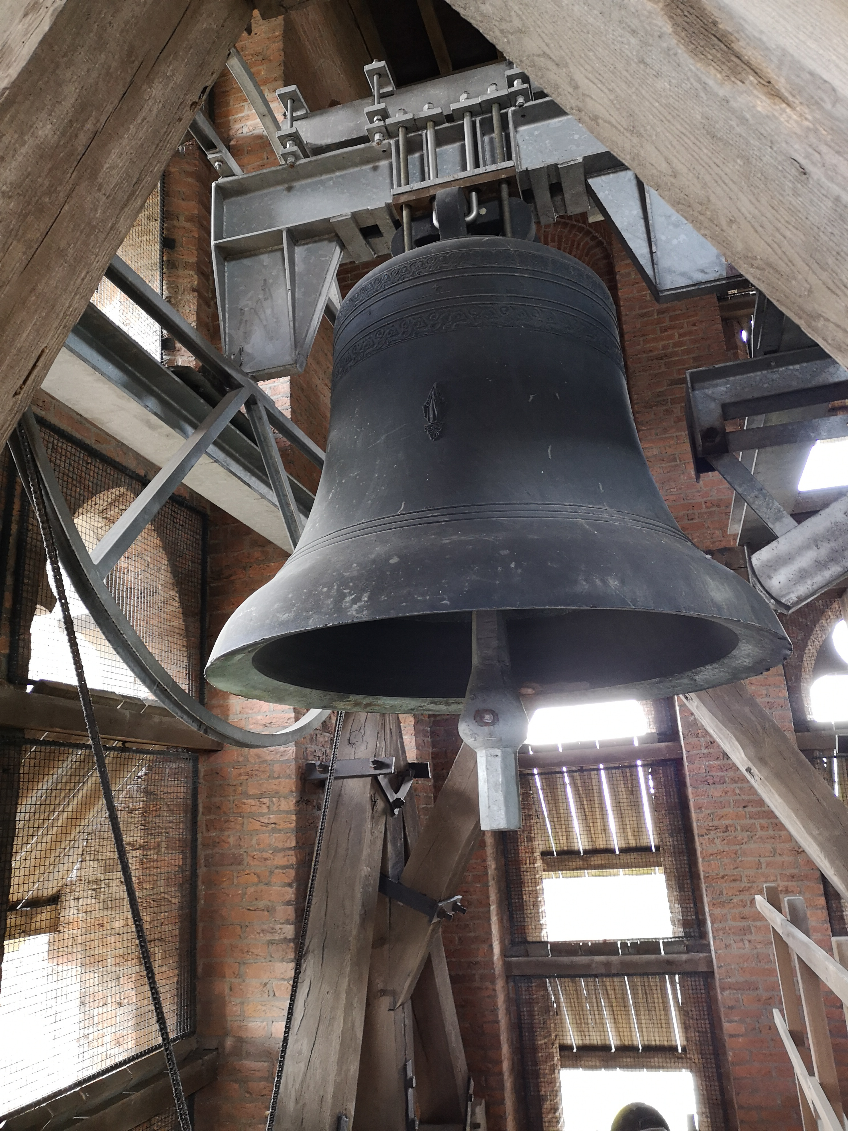 U ziet hier luidklok no 2 van de Petrustoren in Oirschot.